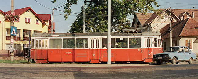 Tramway in Hermannstadt